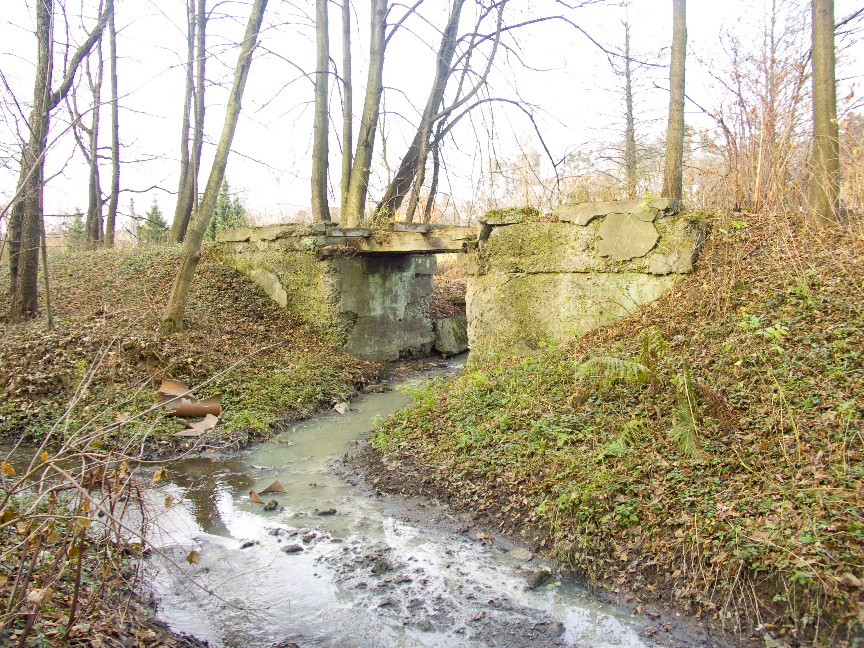 Můstek úzkorozchodné dráhy Ostrava-Karviná Petřvald u Fary Husitského sboru (podzim 2009)